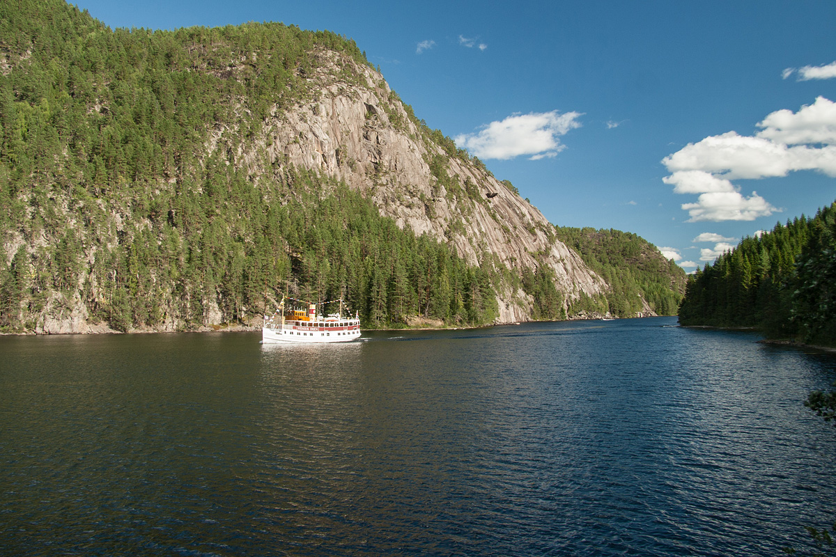 MS «Henrik Ibsen» på vei oppover Strauman.